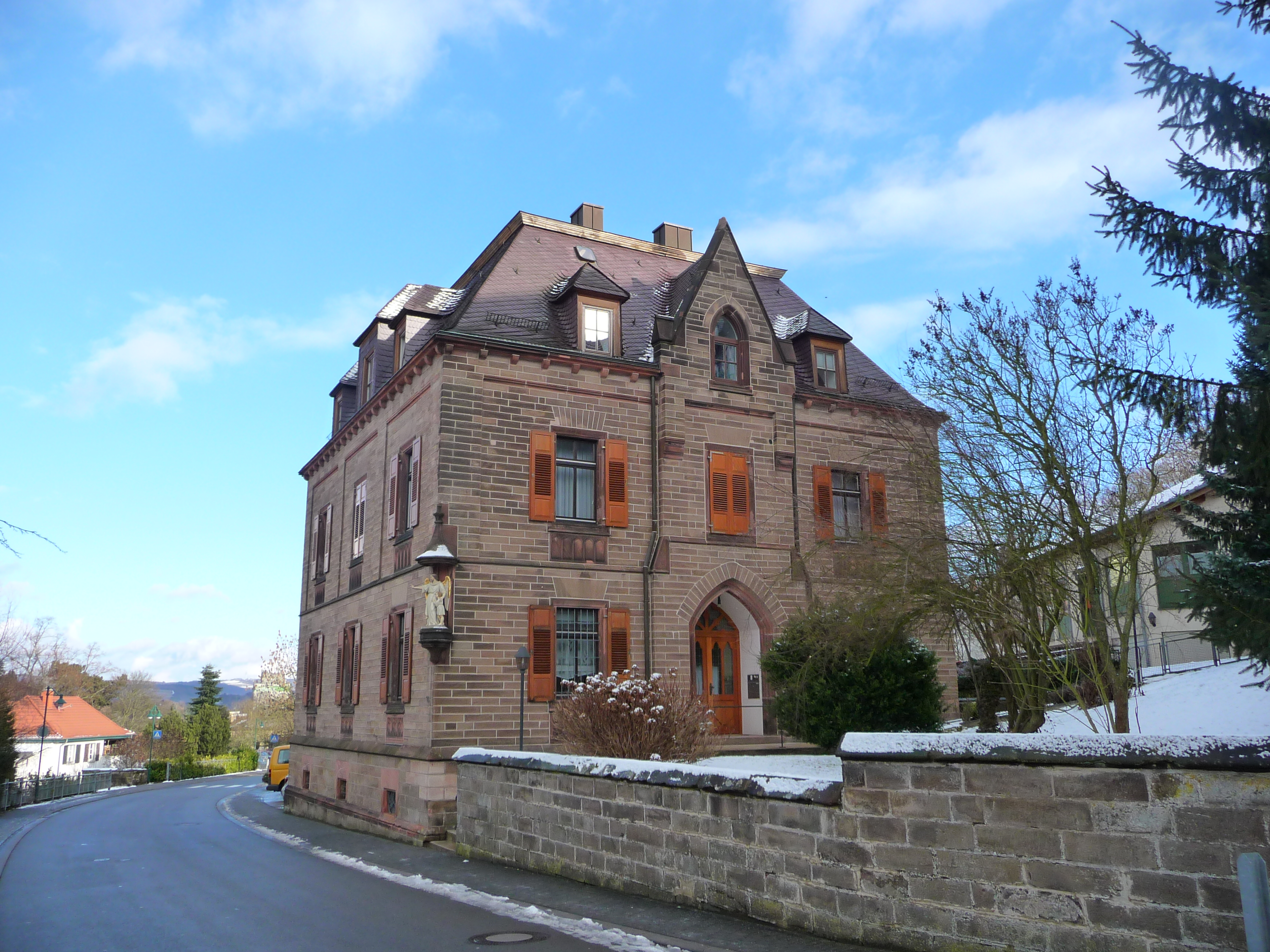 Katholisches Pfarramt St. Ägidius in Kusel (Kreis Kusel, Deutschland)